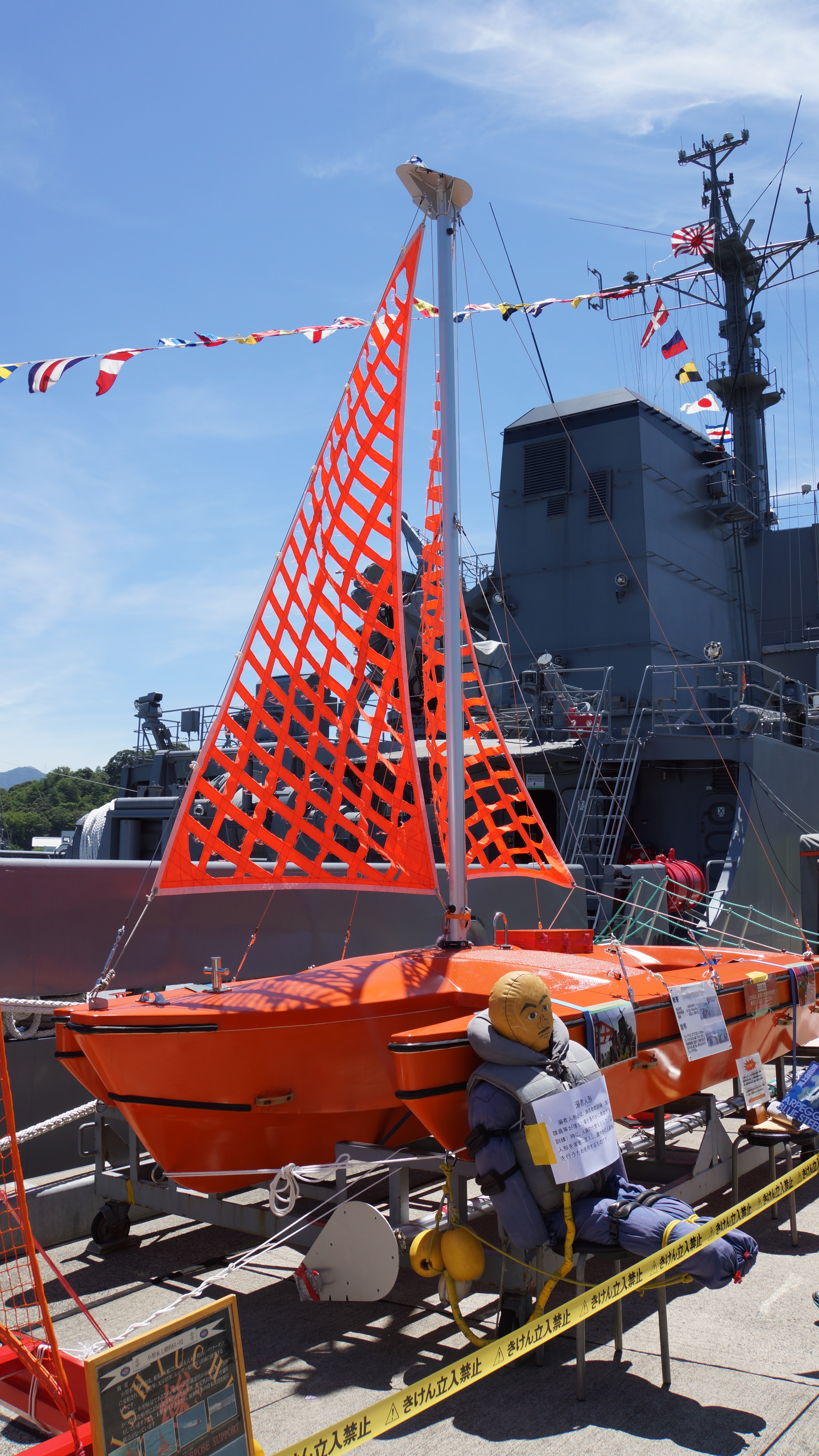 海上自衛隊 高速小型水上標的1形 マスト展開状態。 2015年7月26日 舞鶴基地にて。